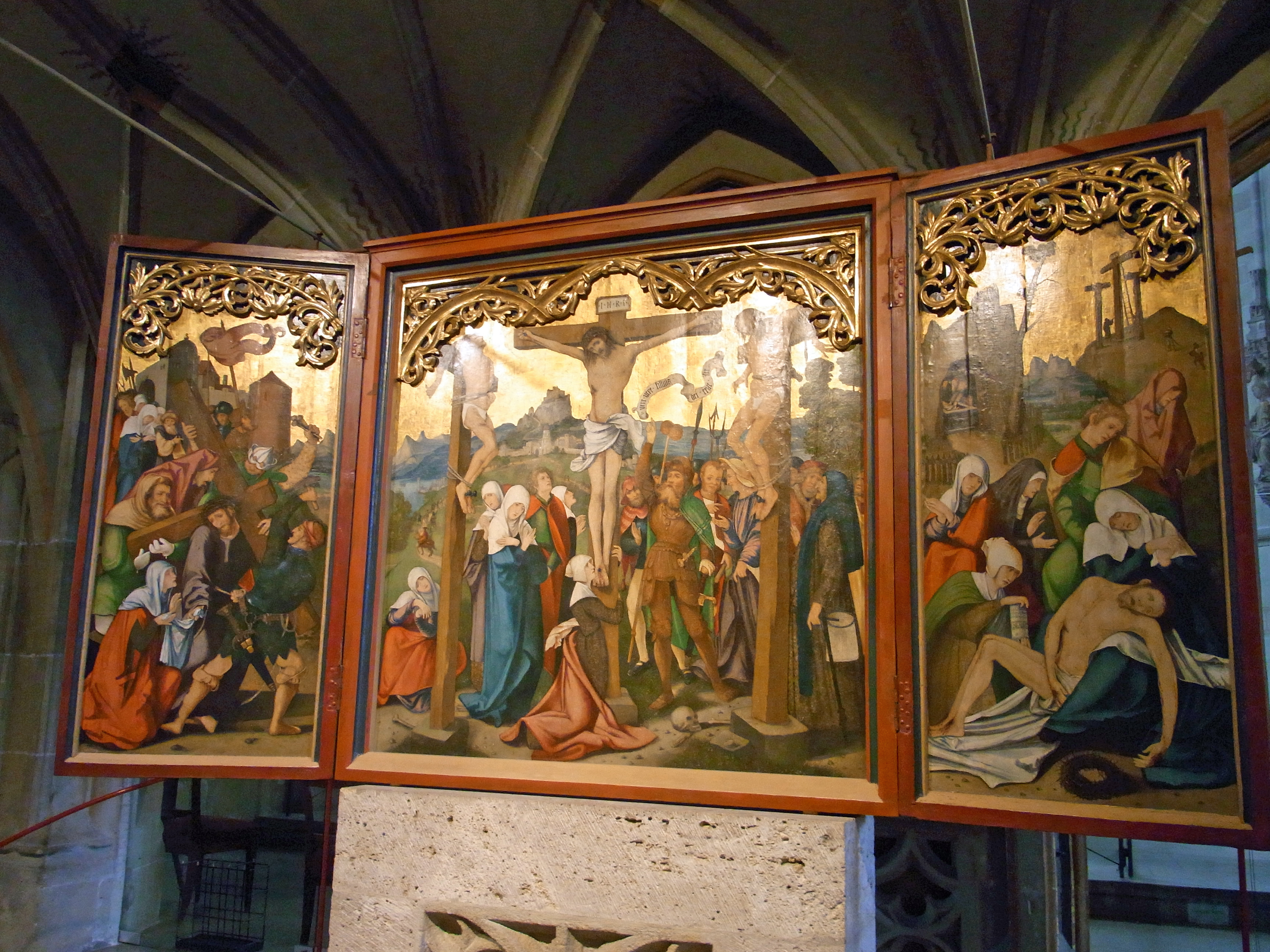 Stiftskirche St. Georg, Tübingen Flügelaltar Hans Schäufelin